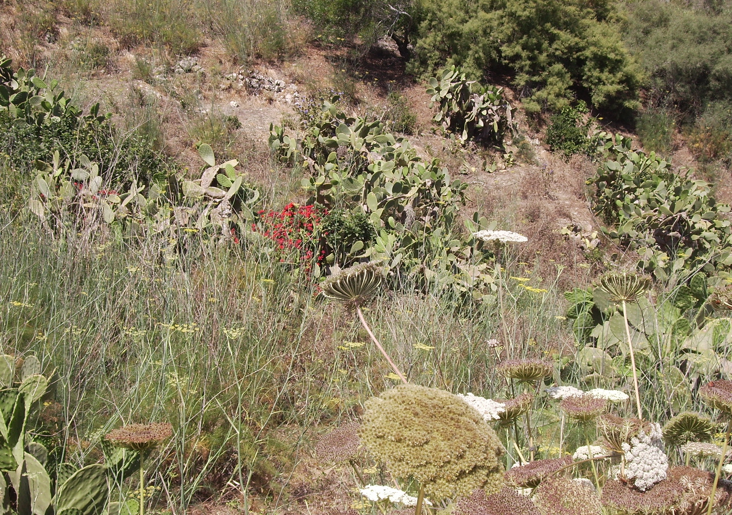 Ramla Bay 3